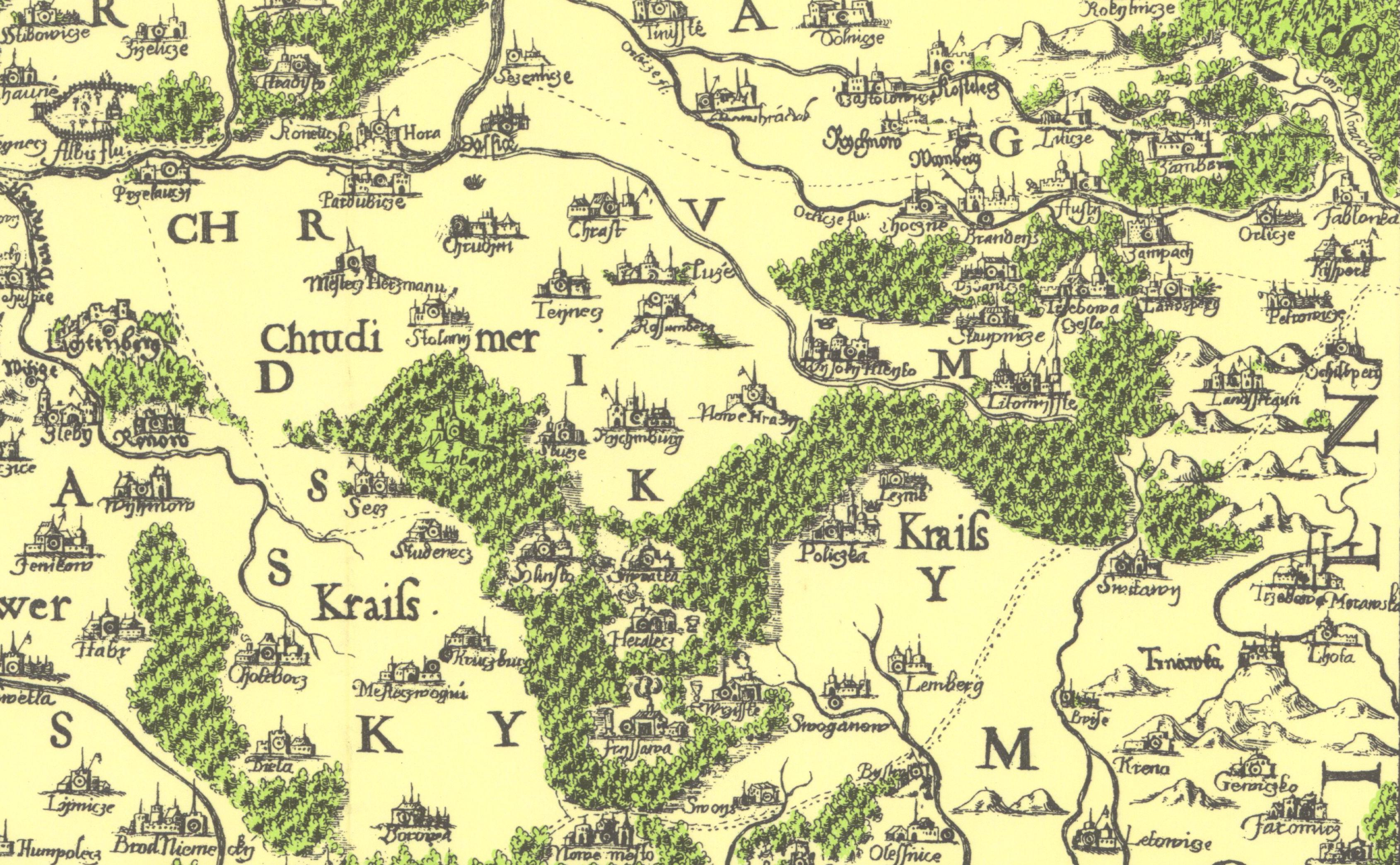 Nejstarší vyobrazení Chrudimského kraje na Aretinově mapě 1619. Ústí nad Orlicí zde neni ještě součastí kraje.